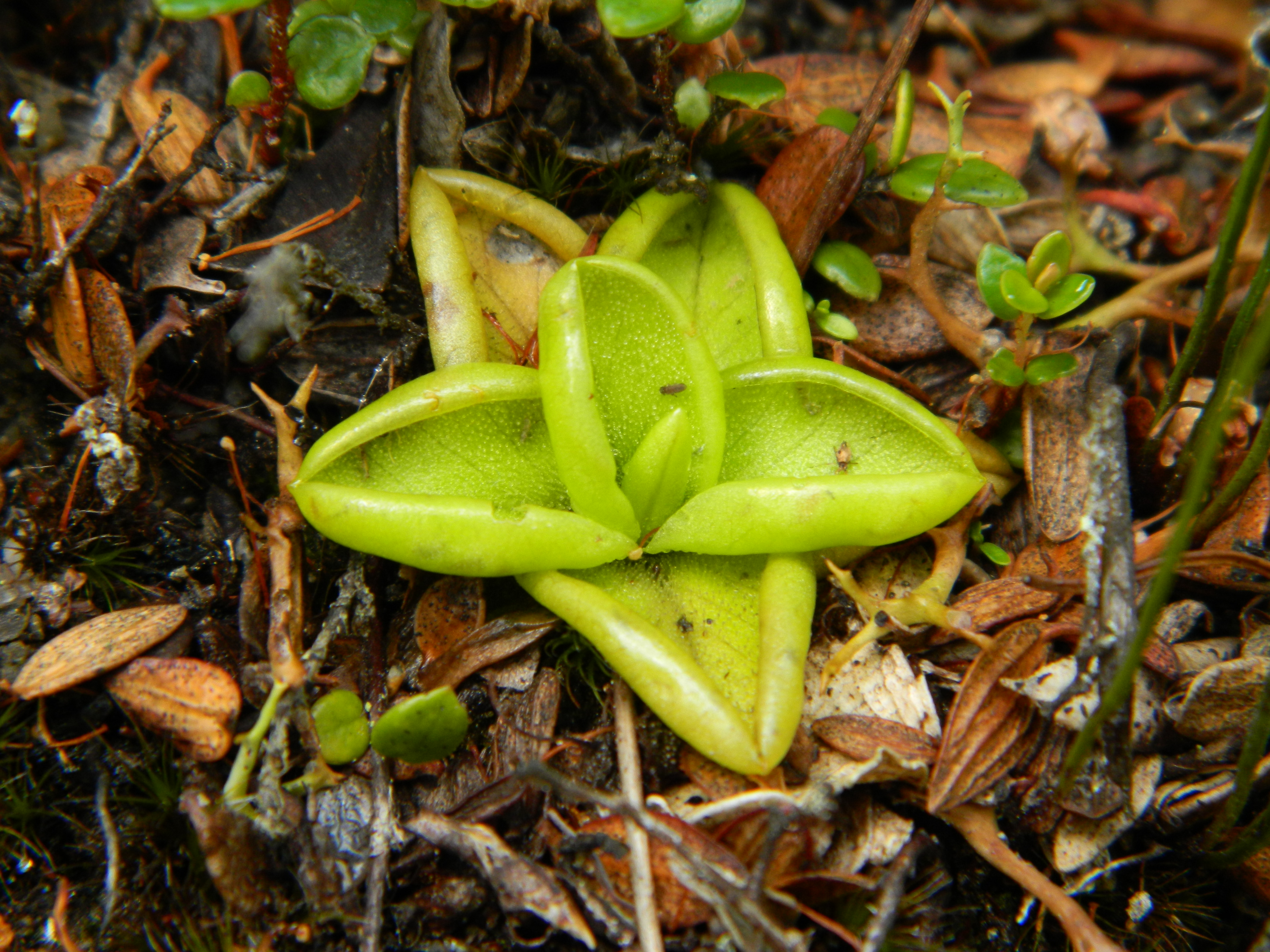 Planta Carnívora Chile